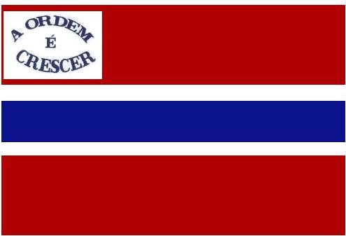 Bandeira do município baiano de Barra do Mendes